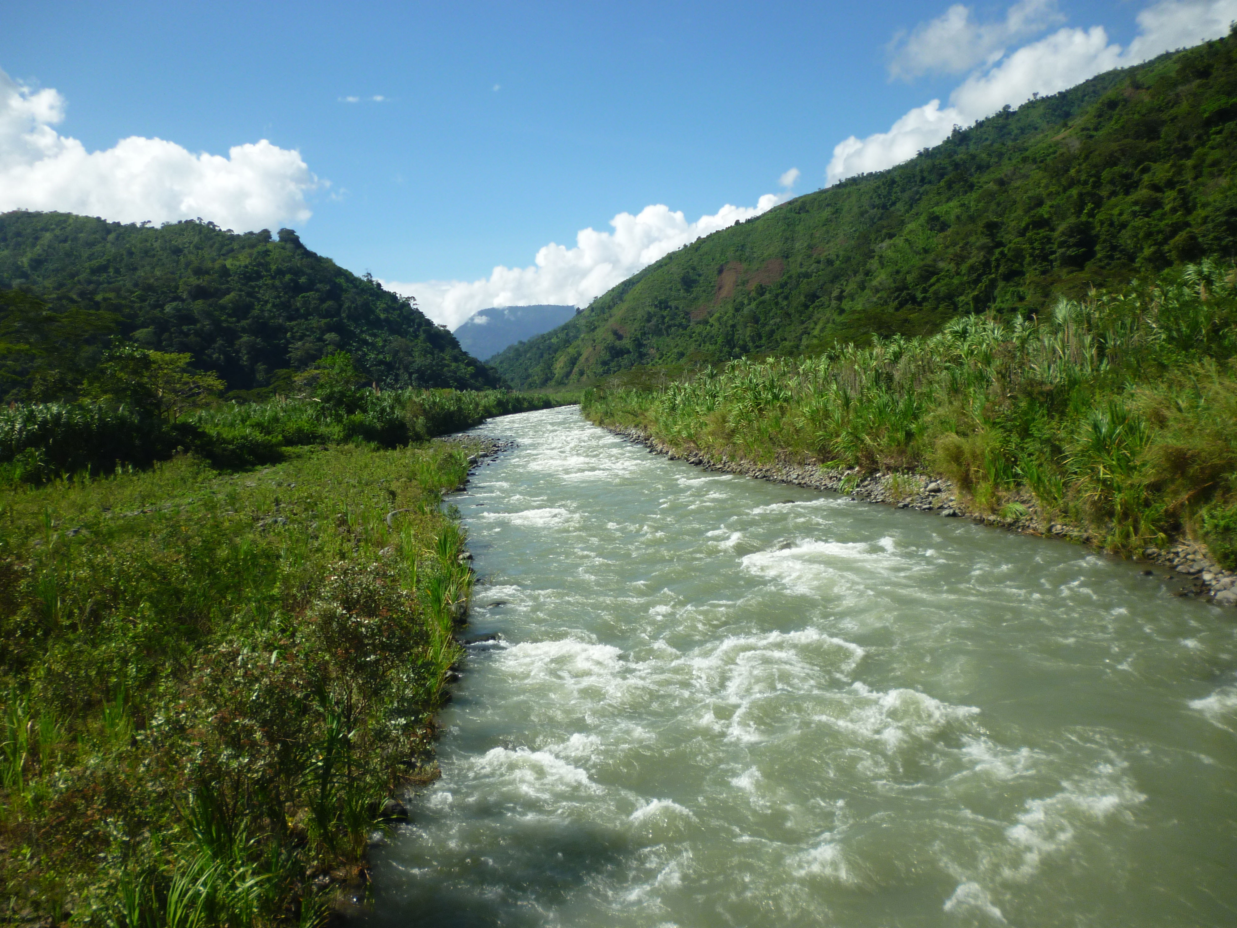 Río Chirripó a la altura de Ñárí.